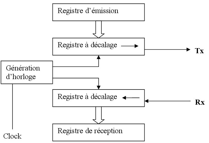 Schema de constitution d'une uart This diagram image could be recreated using vector graphics as an SVG file. This has several advantages; see Commons:Media for cleanup for more information. If an SVG form of this image is available, please upload it and afterwards replace this template with vector version available|new image name . It is recommended to name the SVG file "Schema uart.svg" - then the template Vector version available (or Vva) does not need the new image name parameter.